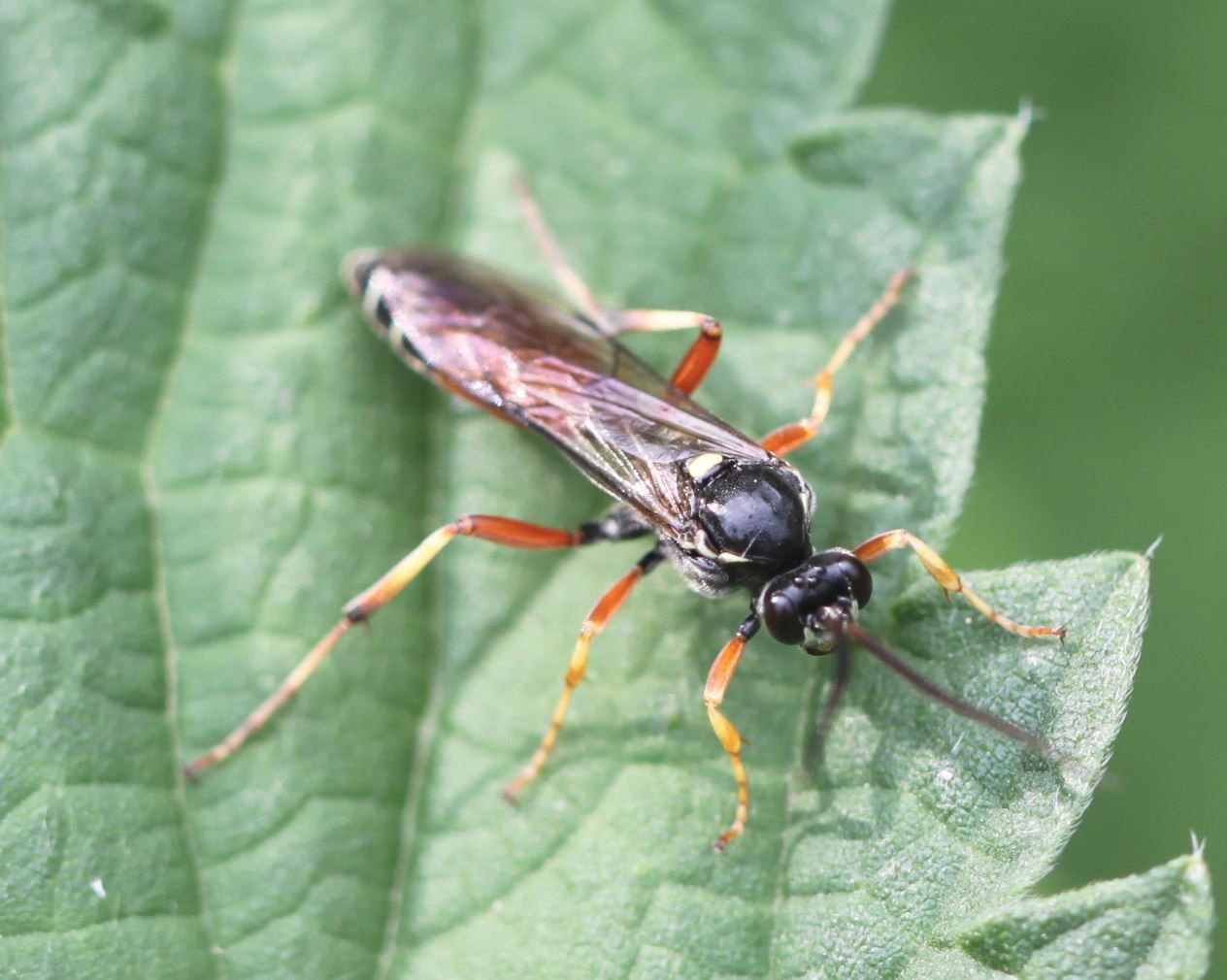 Schlupfwespe Ctenichneumon panzeri, Männchen, am 16. Mai 2018 in der Schwetzinger Hardt